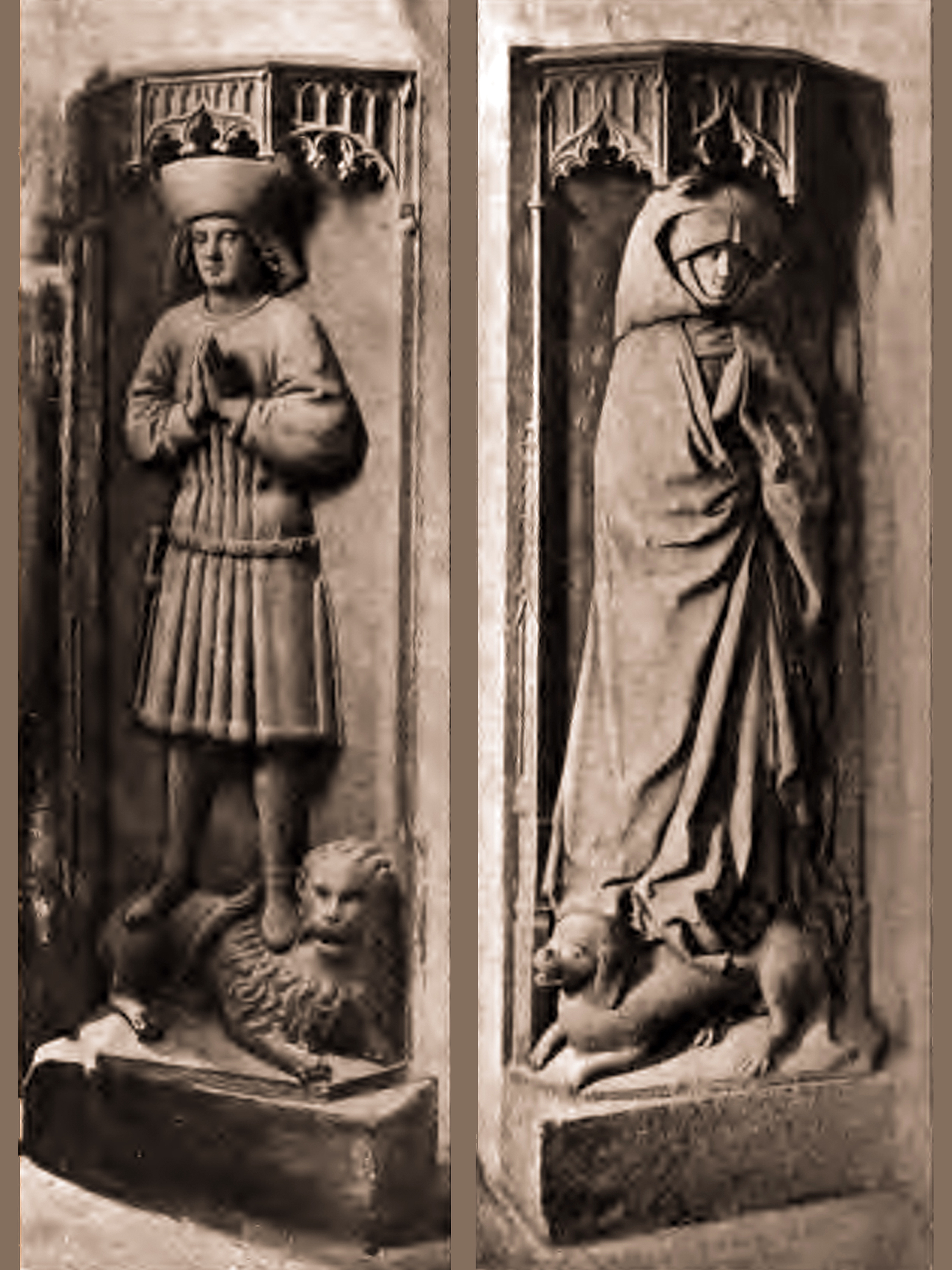 Граф Фридрих V и Сюзанна